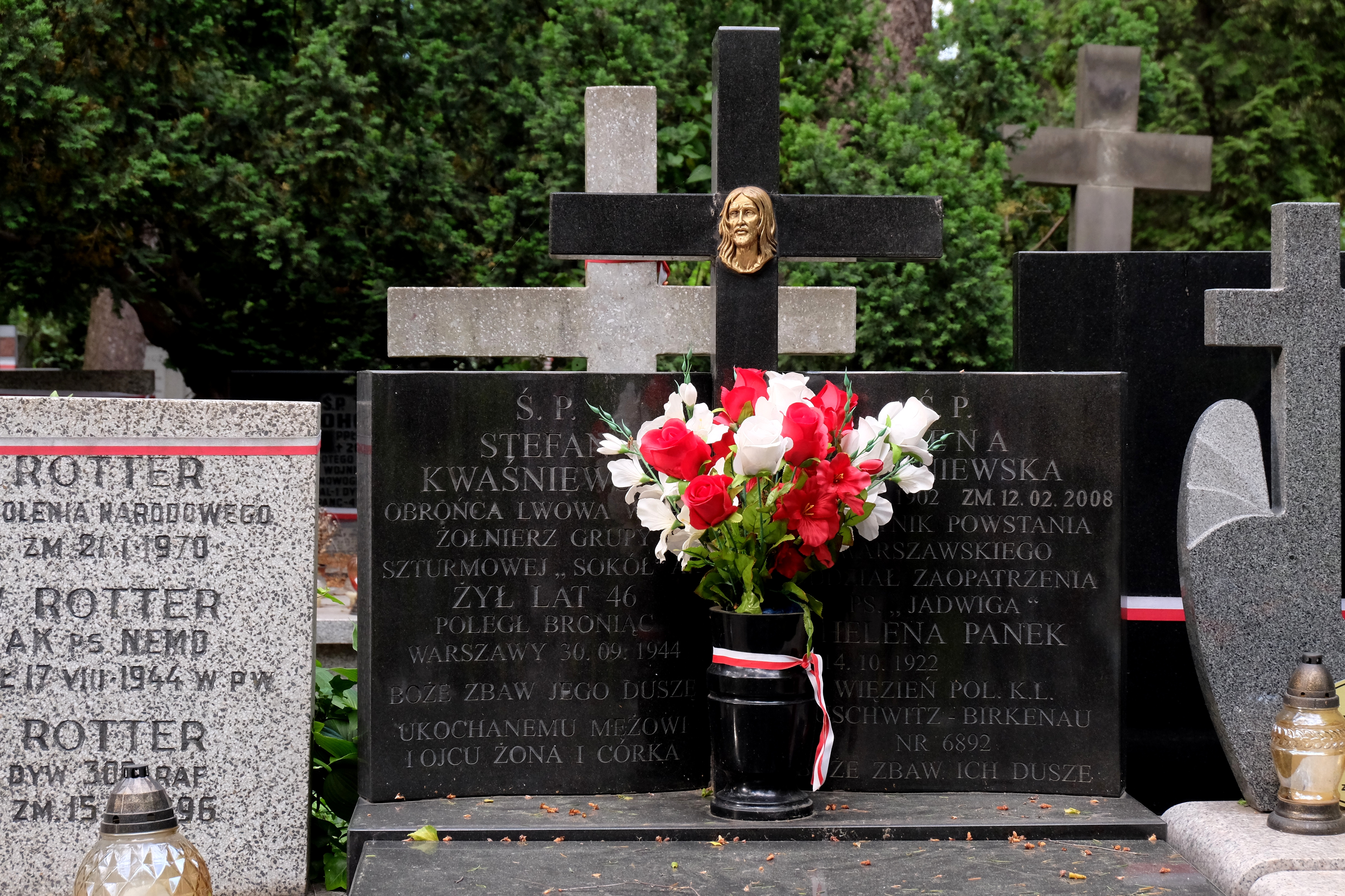 Grób dziennikarza Stefana Kwaśniewskiego i jego żony Ireny Kwaśniewskiej (uczestnicy powstania warszawskiego) na Cmentarzu Wojskowym na Powązkach w Warszawie